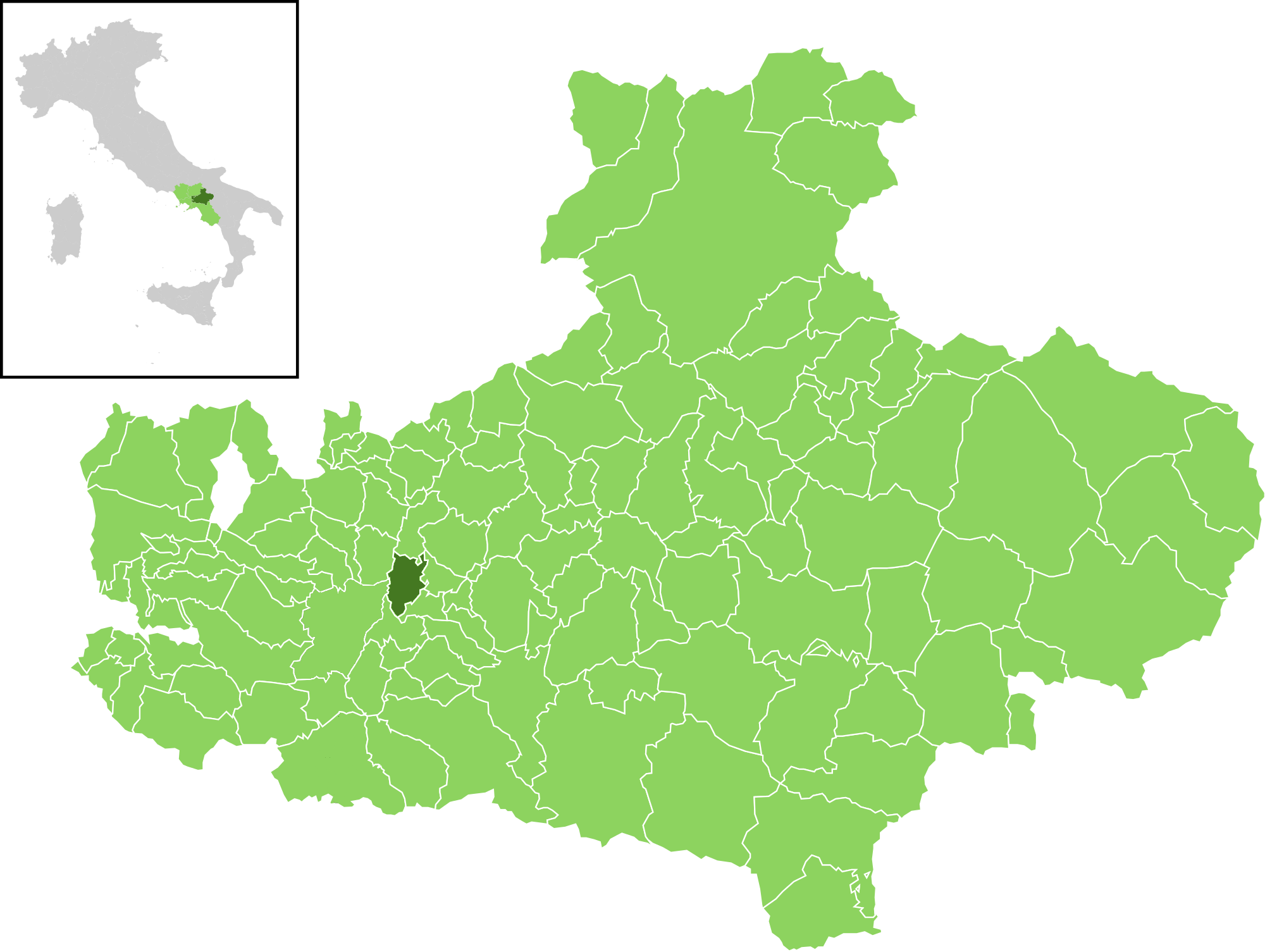 Il comune all'interno della provincia di Avellino